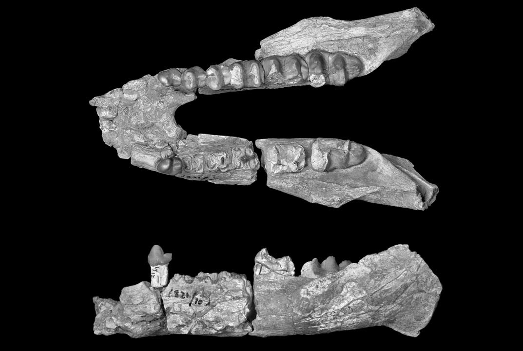 Holotype mandible (BMNH M. 82163a, b, c) of the proboscidean Arcanotherium savagei (Court, 1995), from the Idam Unit (early Oligocene) of Dor El Talha, Libya in occlusal (A) and lateral (B) views.